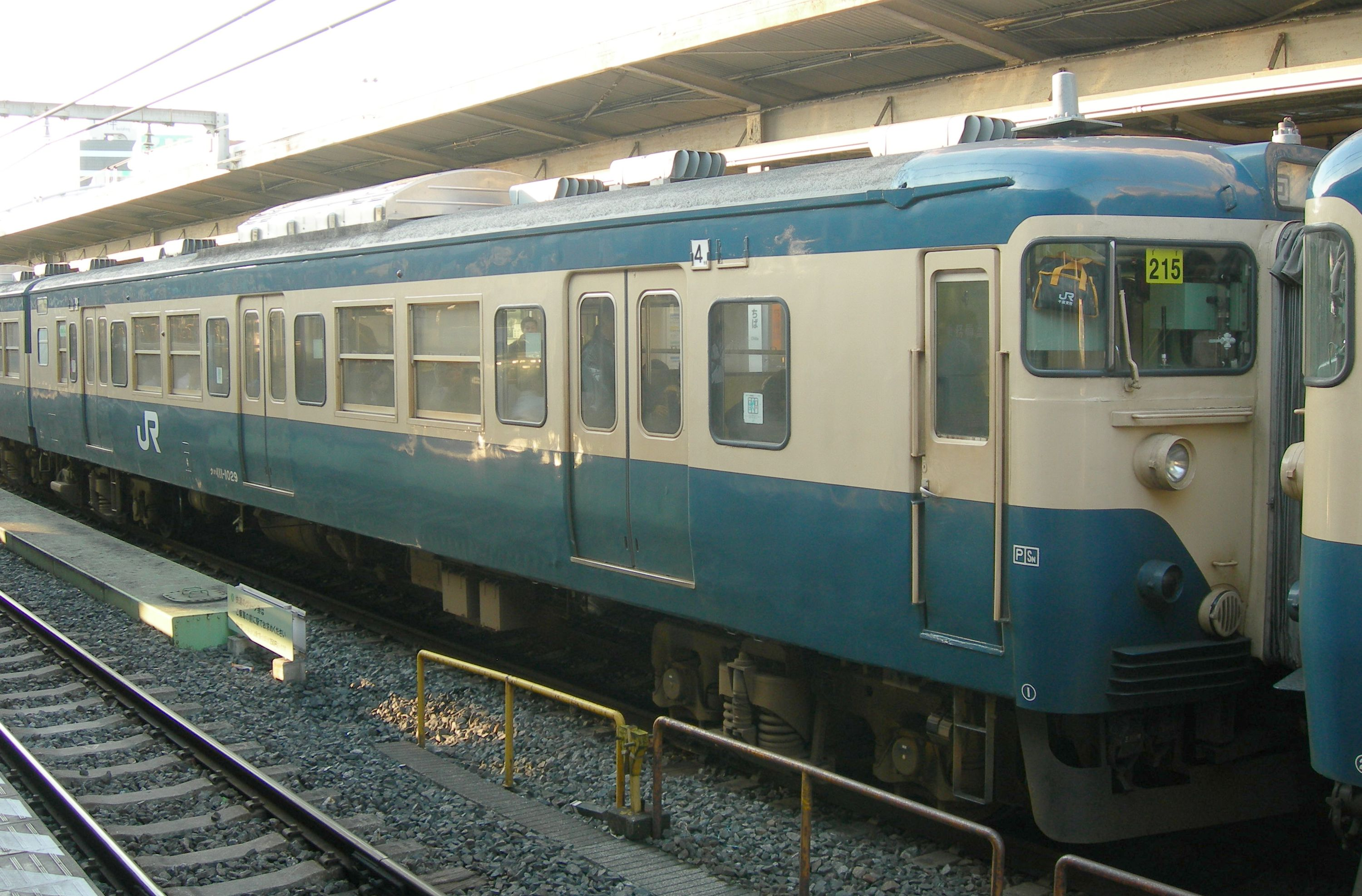 JR東日本111系電車